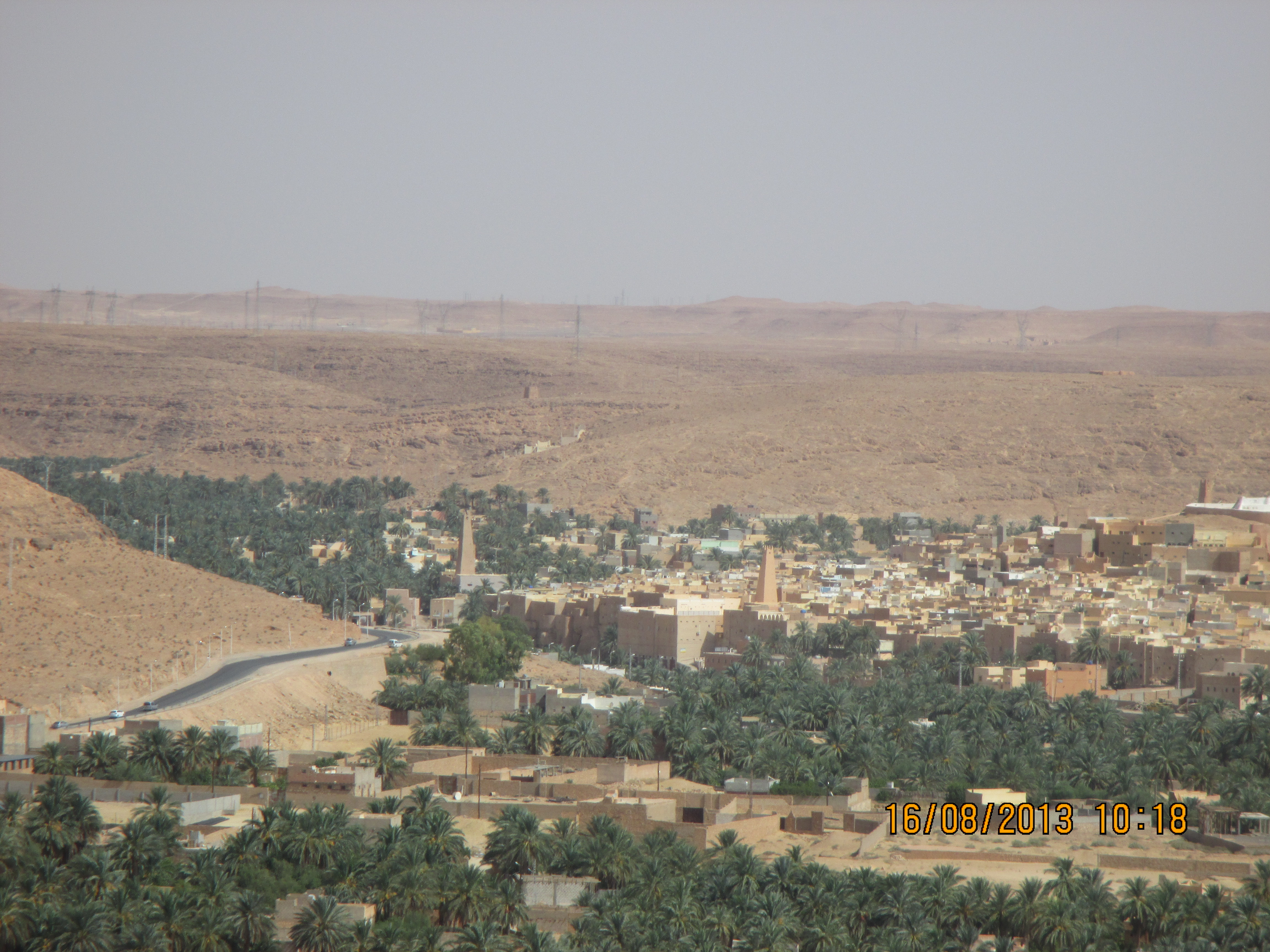 Algérie Wilaya de Ghardaïa